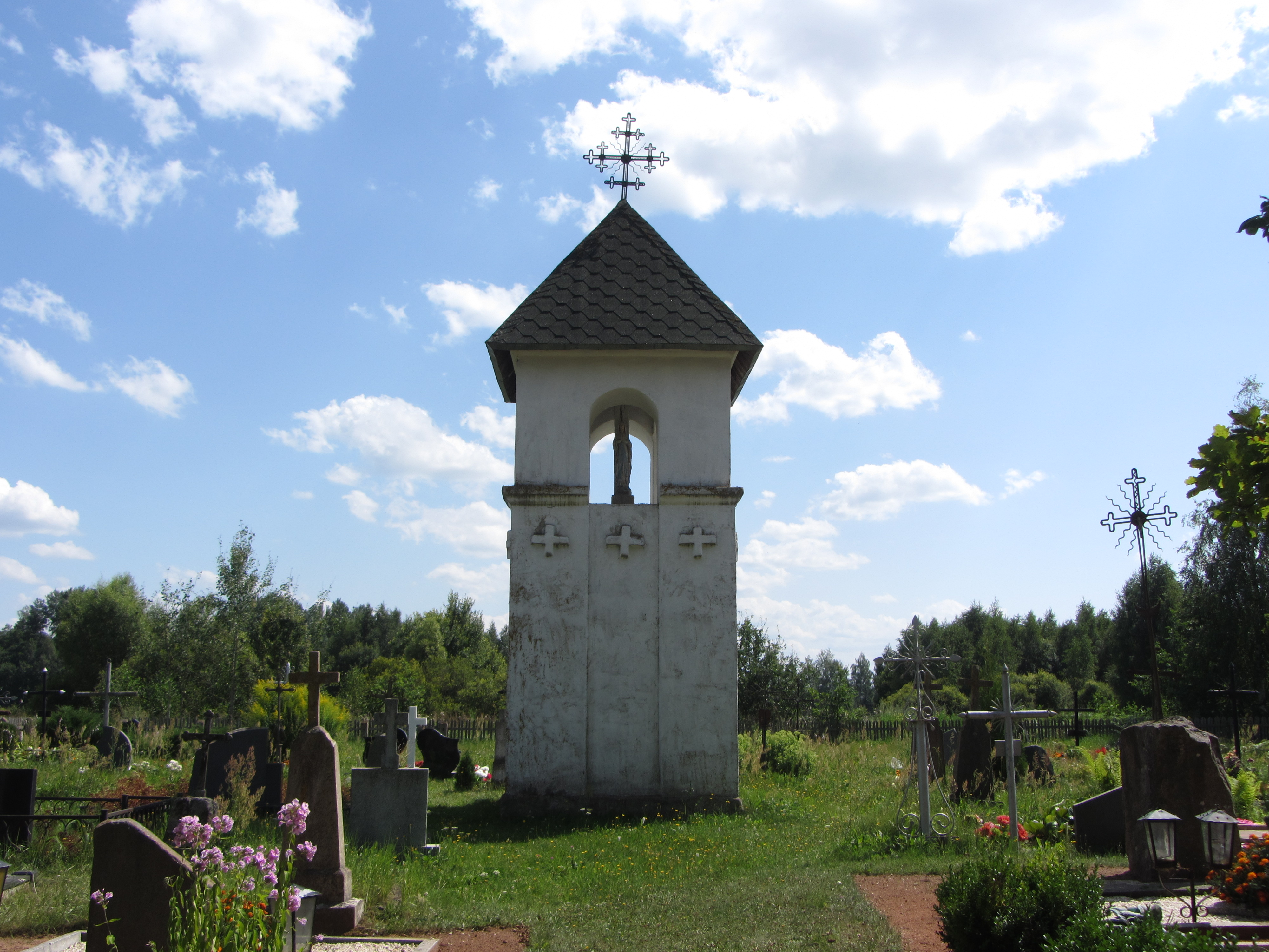 Adutiškio sen., Lithuania